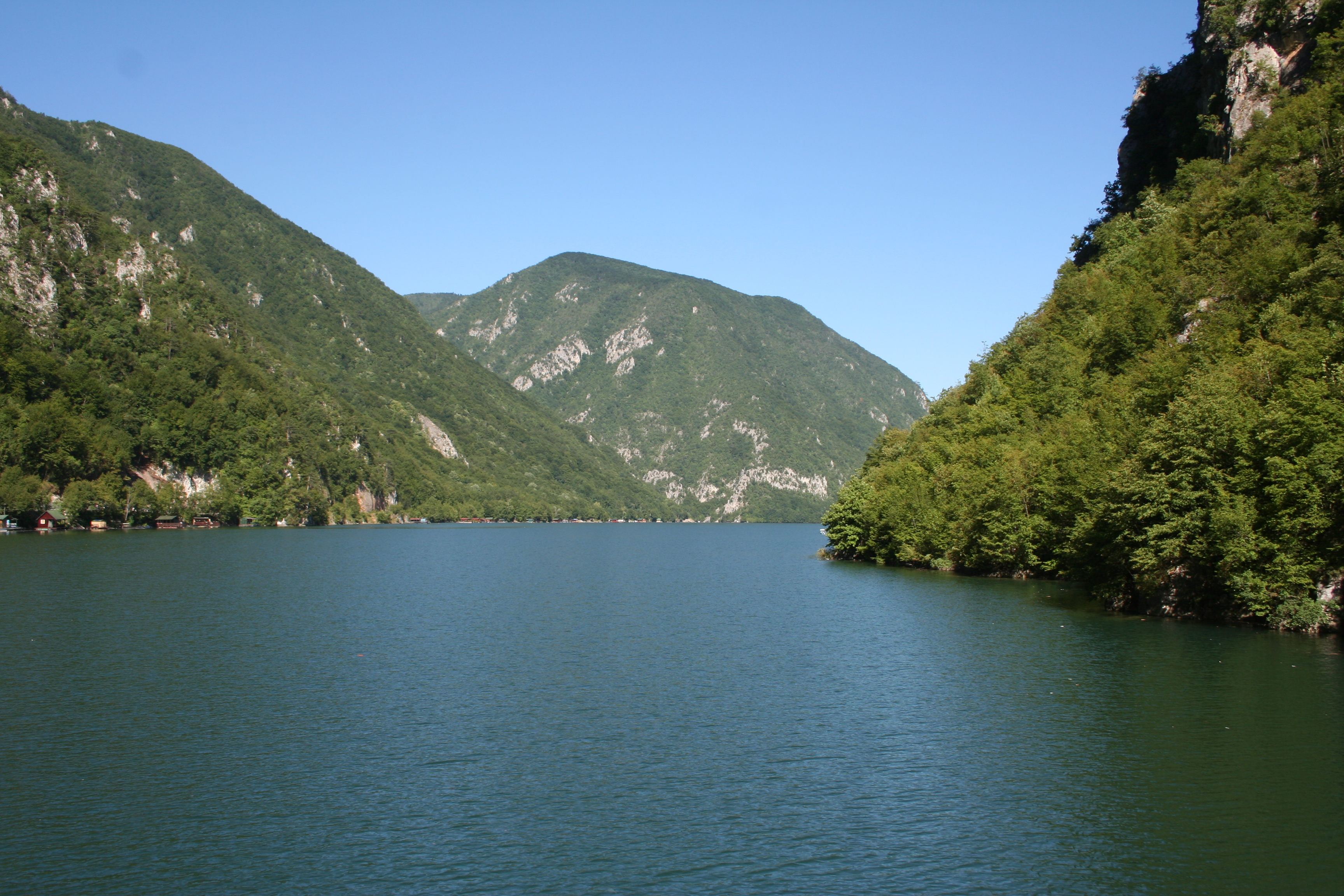 Krstarenje Drinom brodom Grizzly 2, Perućac-Višegrad